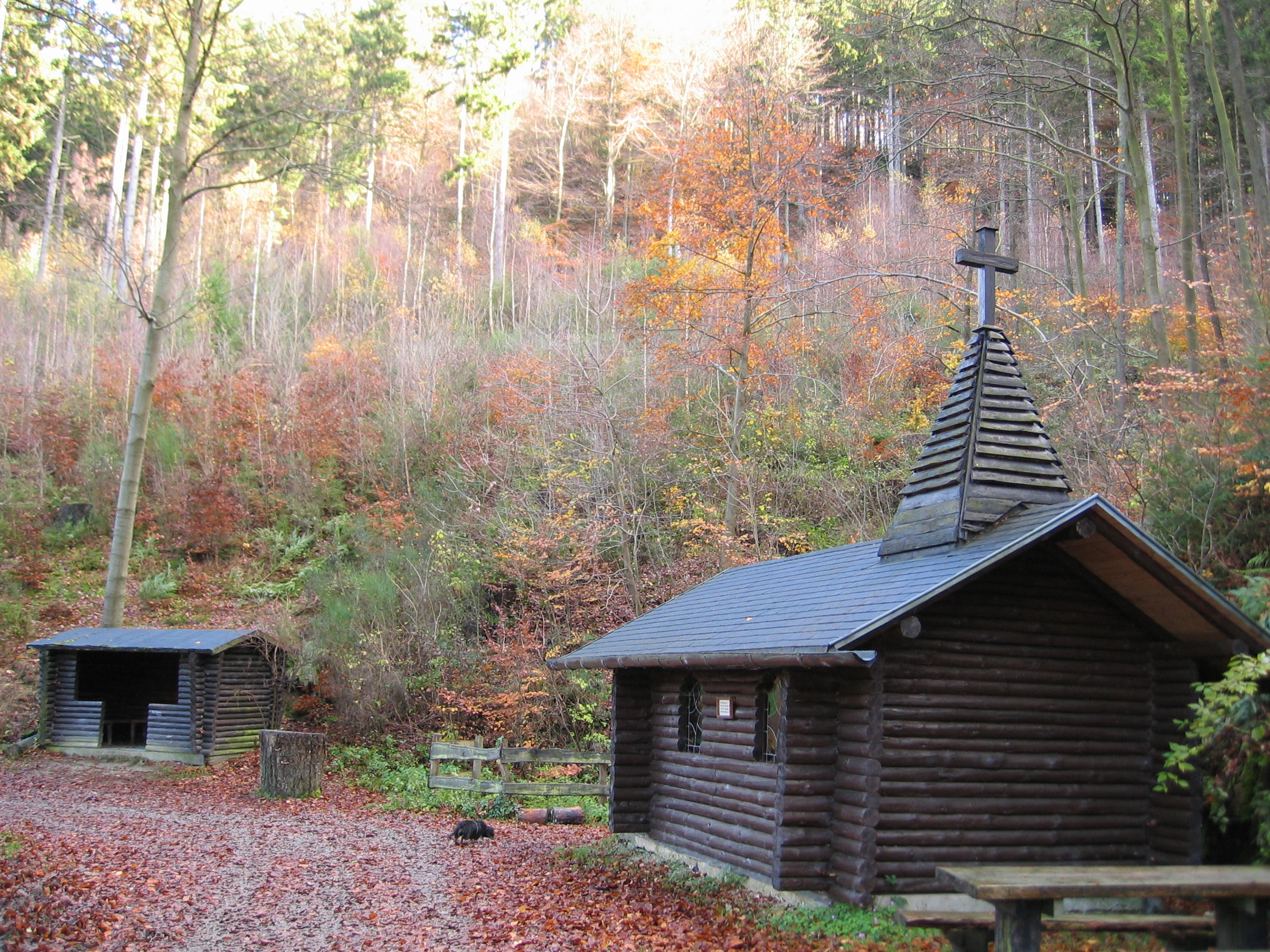 Waldkapelle Hirschrott/Erkensruhr